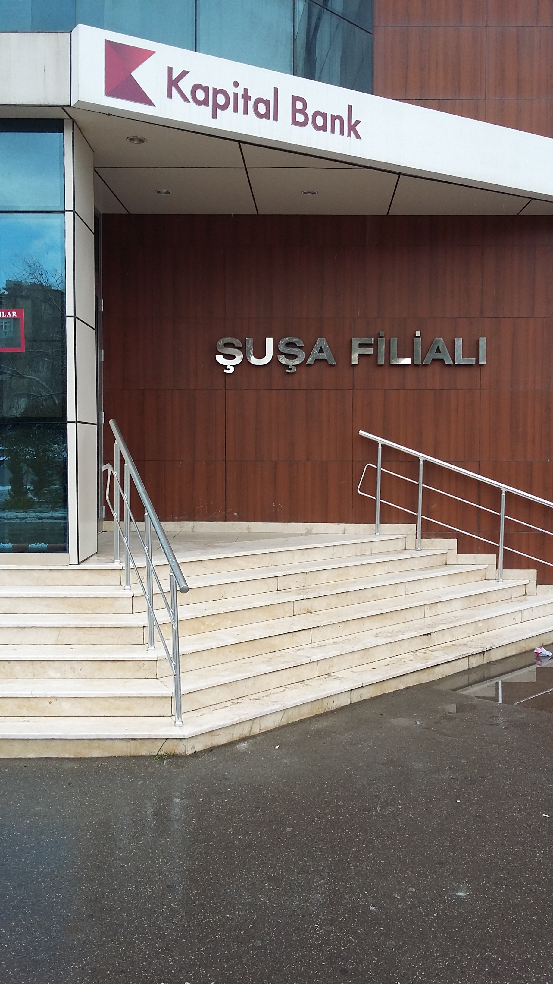 Kapital bank Şuşa filialı. İbrahimpaşa Dadaşov küçəsində.